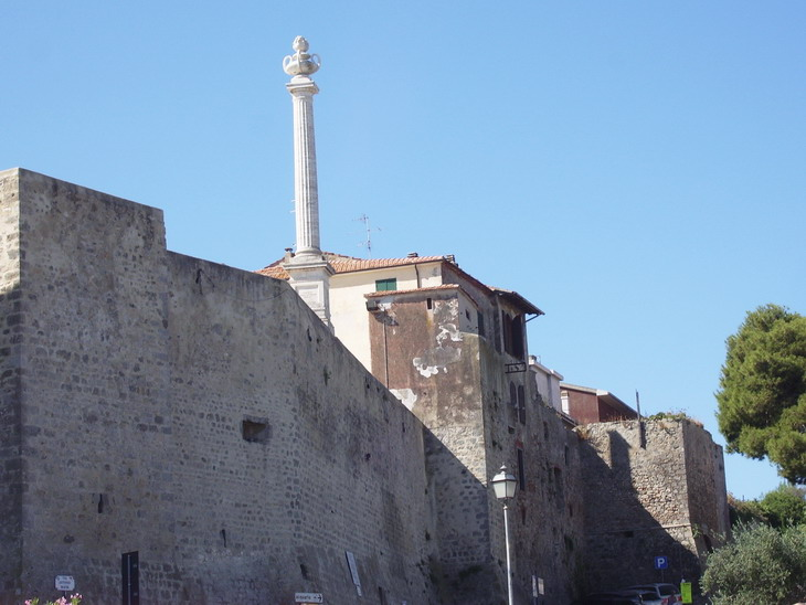 Scorcio delle Mura di Talamone